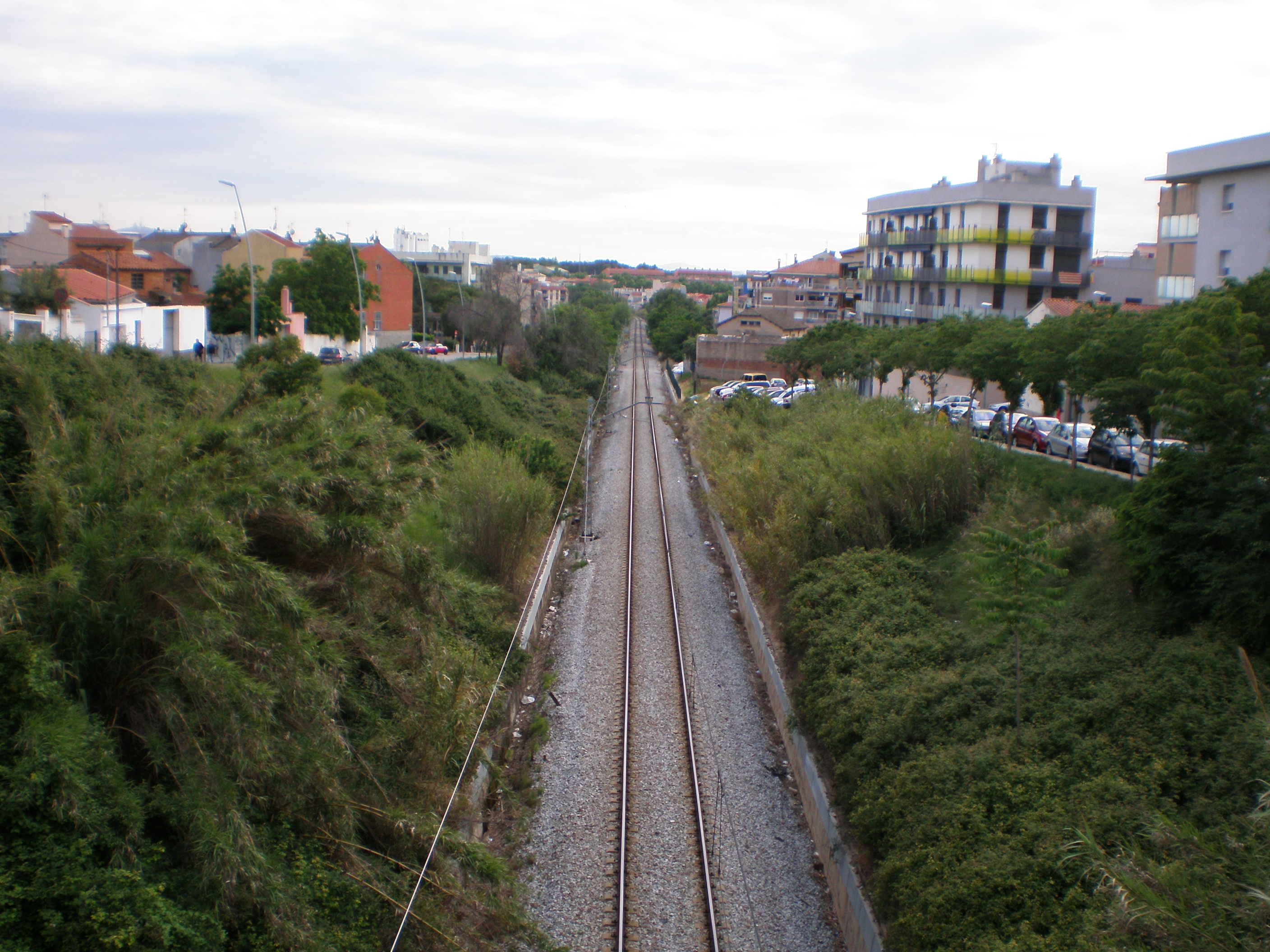 Línea de Puigcerdà en Mollet del Vallès, mirando hacia Mollet-Santa Rosa y Barcelona.